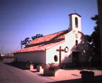 Ermita vieja de Santa Cruz (Murcia), del siglo XVI